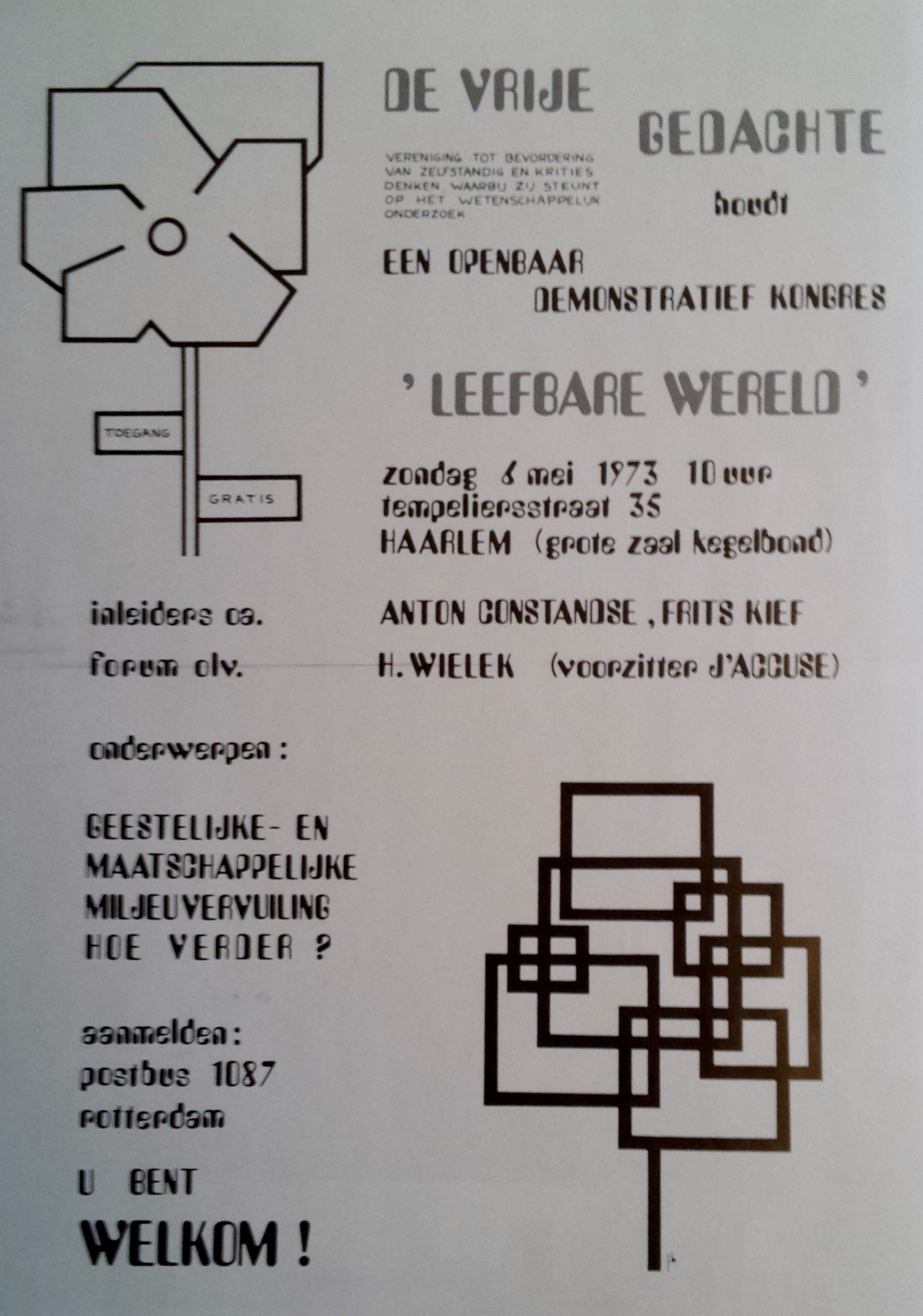 Affiche voor een openbare bijeenkomst van De Vrije Gedachte in 1973.